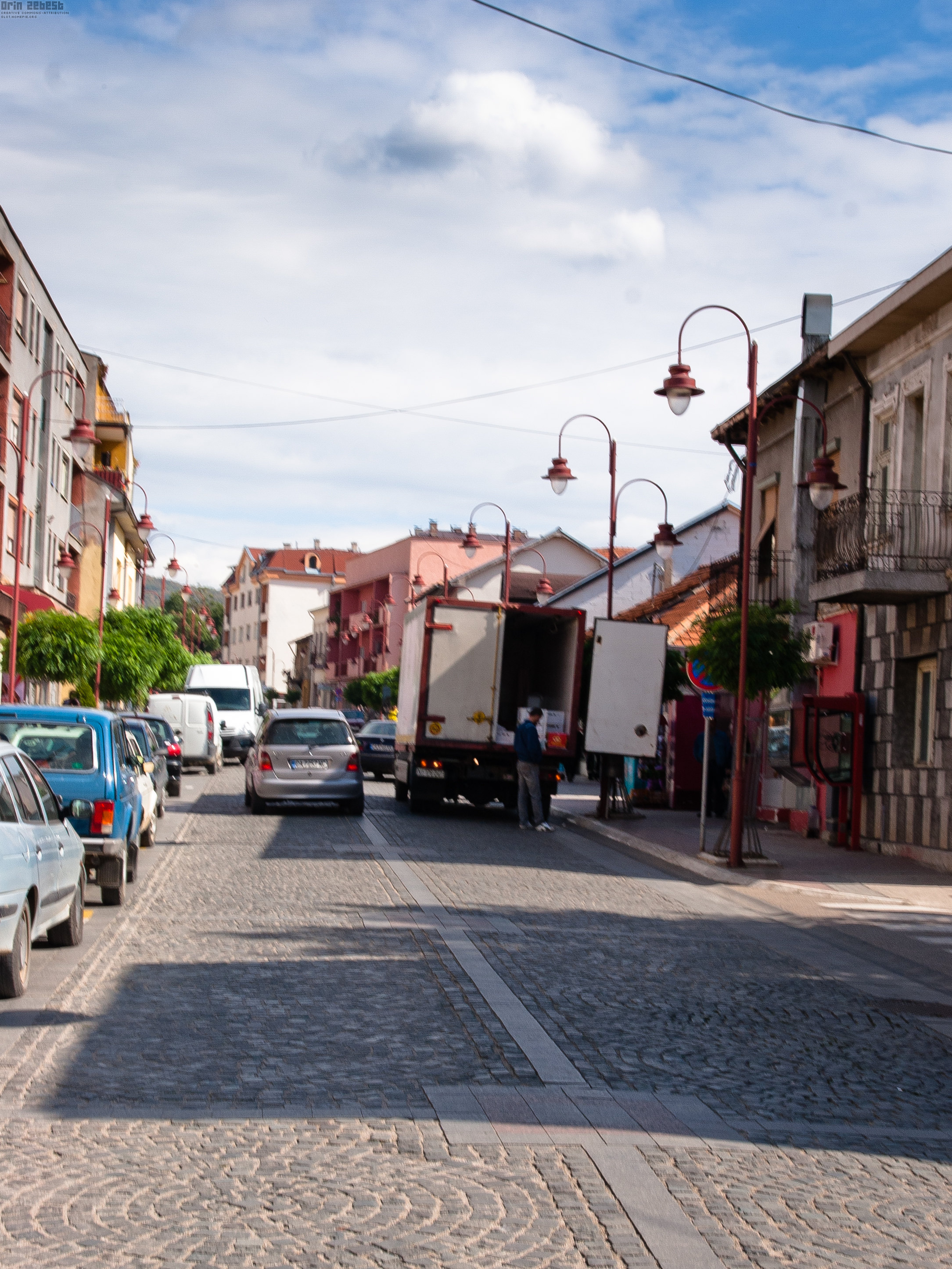 Main Street, Dimitrovgrad